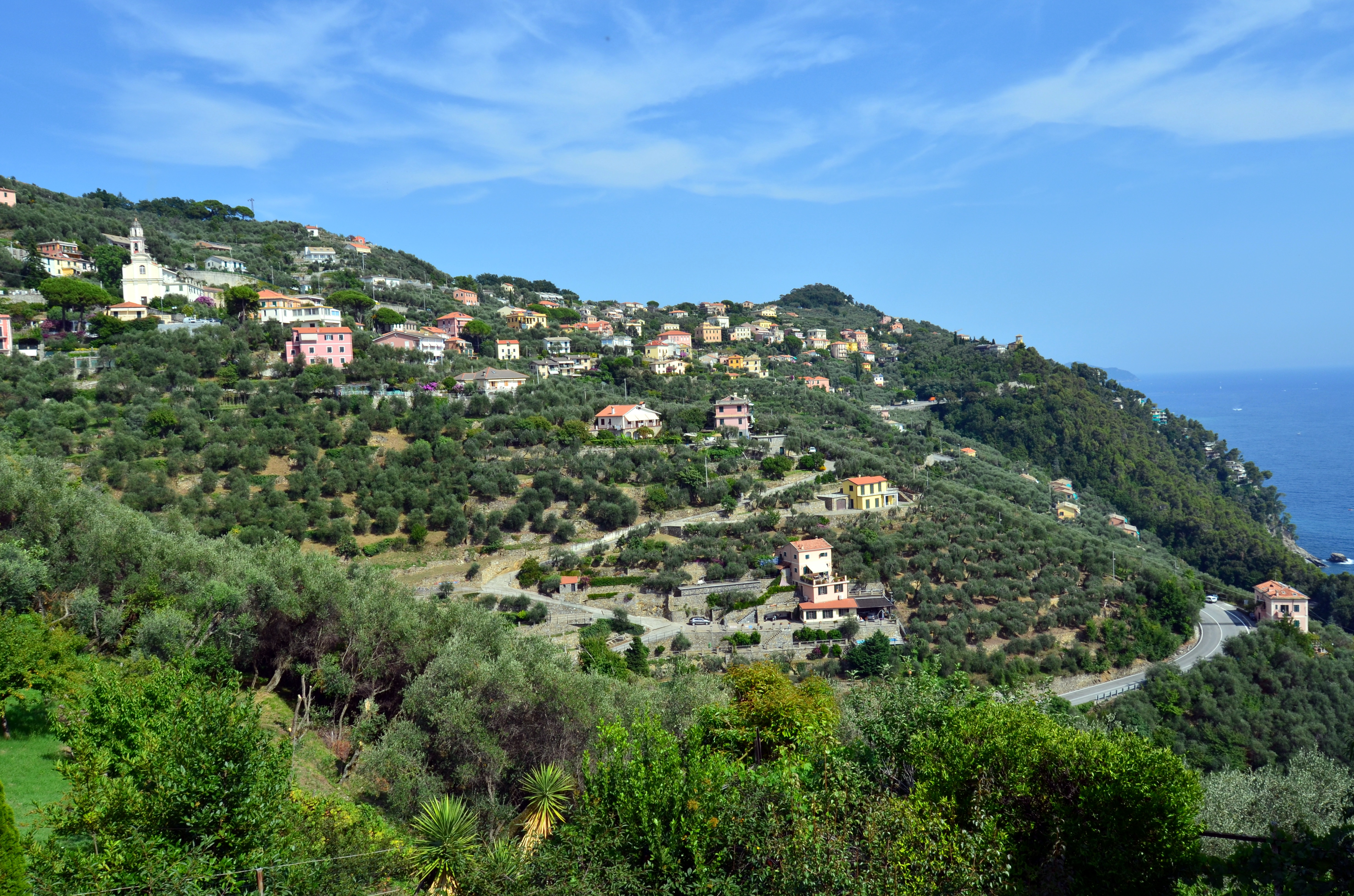 Panorama di Sant'Andrea di Rovereto, Chiavari, Liguria, Italia